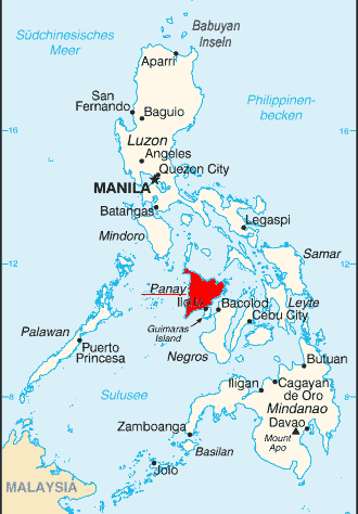 Lage der Insel Panay in den Philippinen